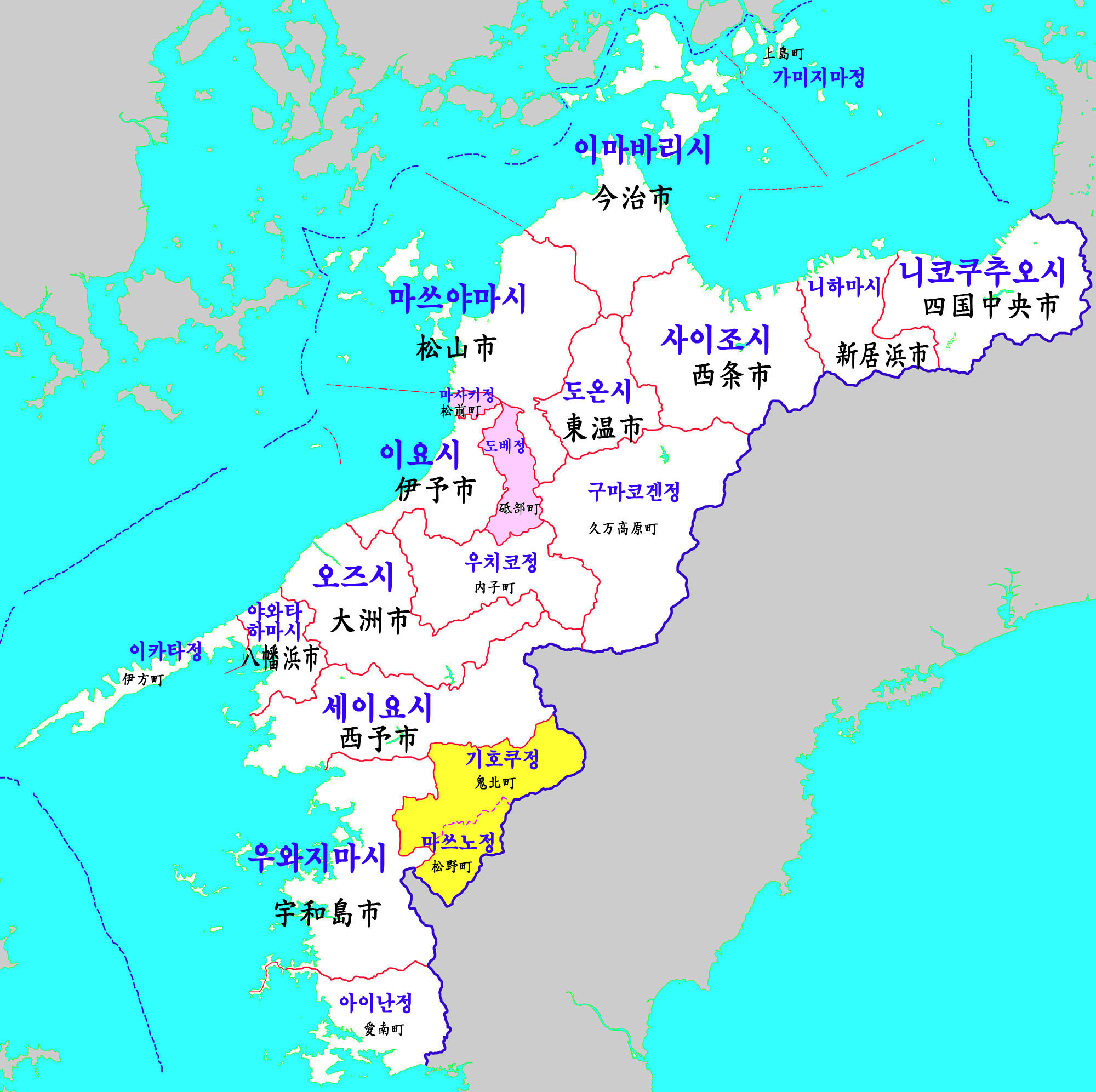 에히메현 행정구역